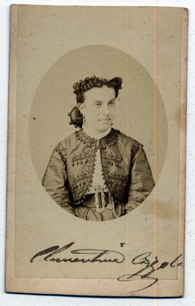 L'attrice Clementina Cazzola